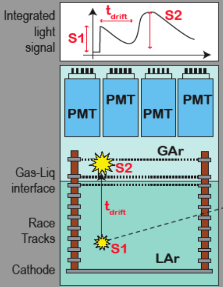 WARP operation principles